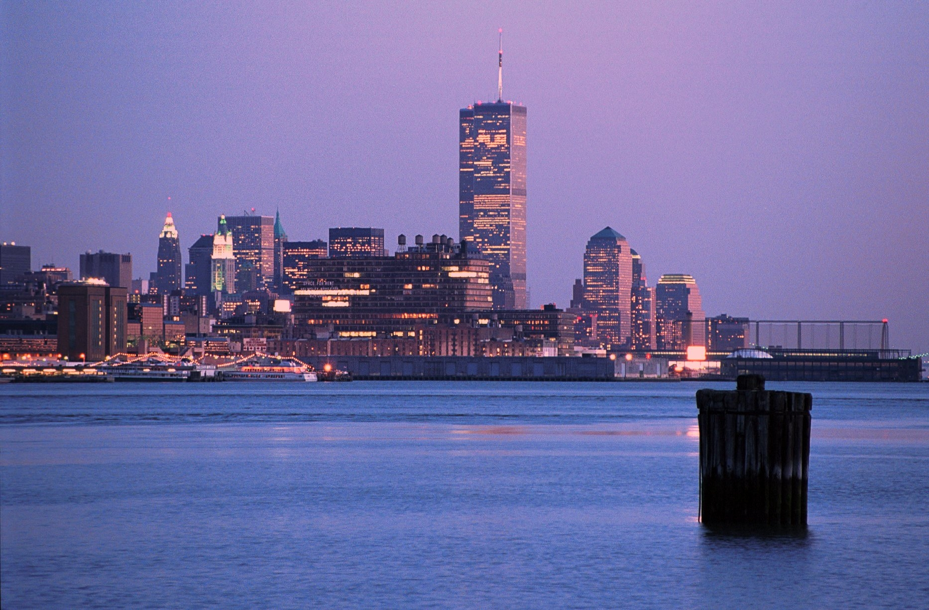 NYC picture